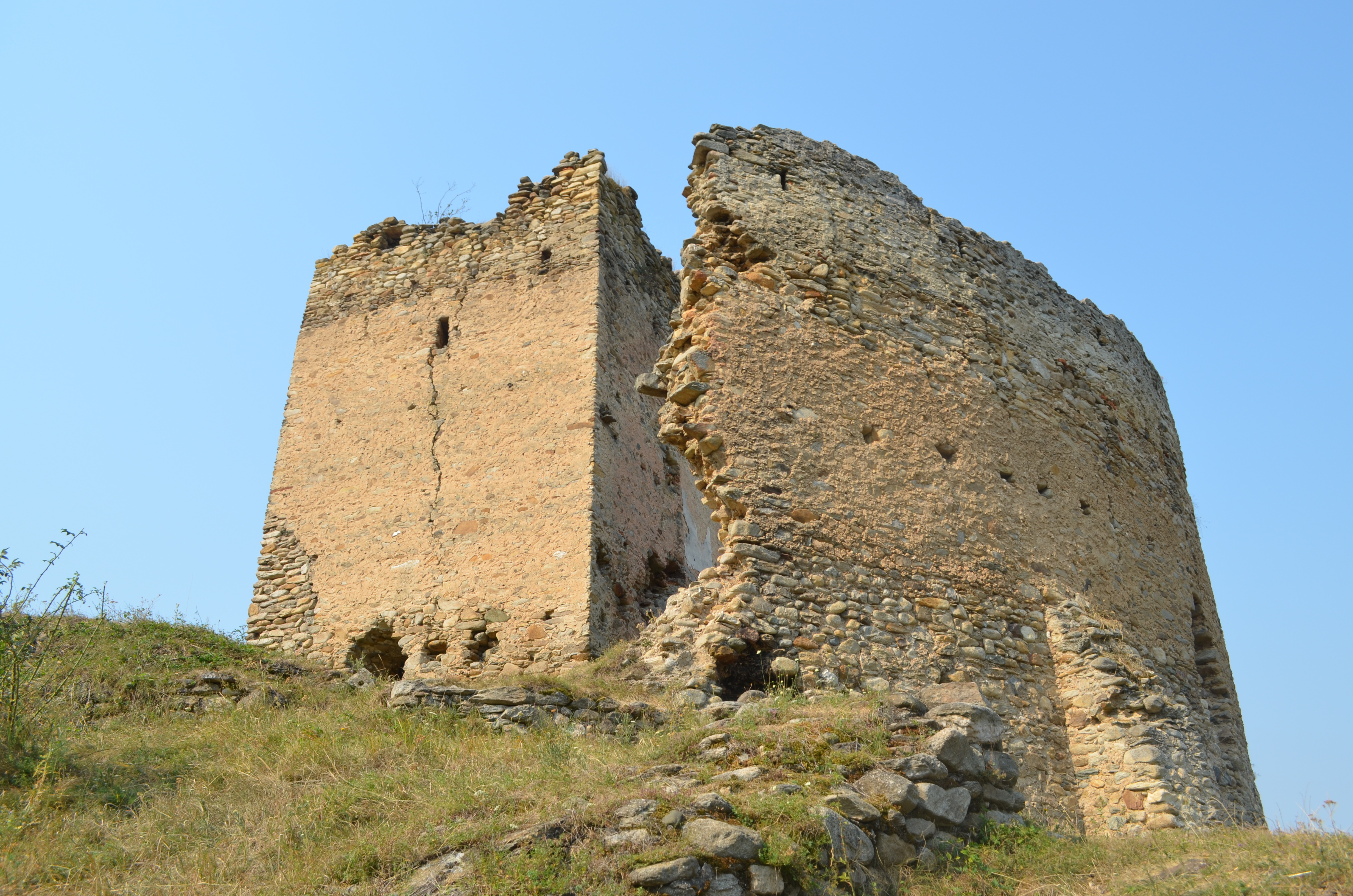 Cetatea Mălăiești, sat Mălăiești; comuna Sălașu de Sus, județul Hunedoara